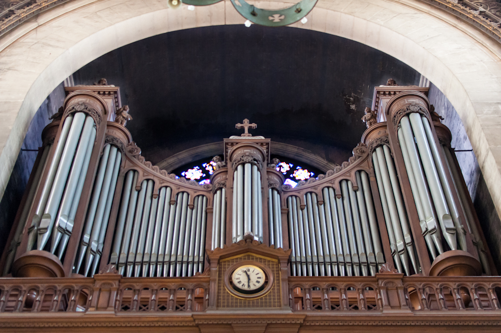 Grand Orgue de l'église Saint Augustin à Paris